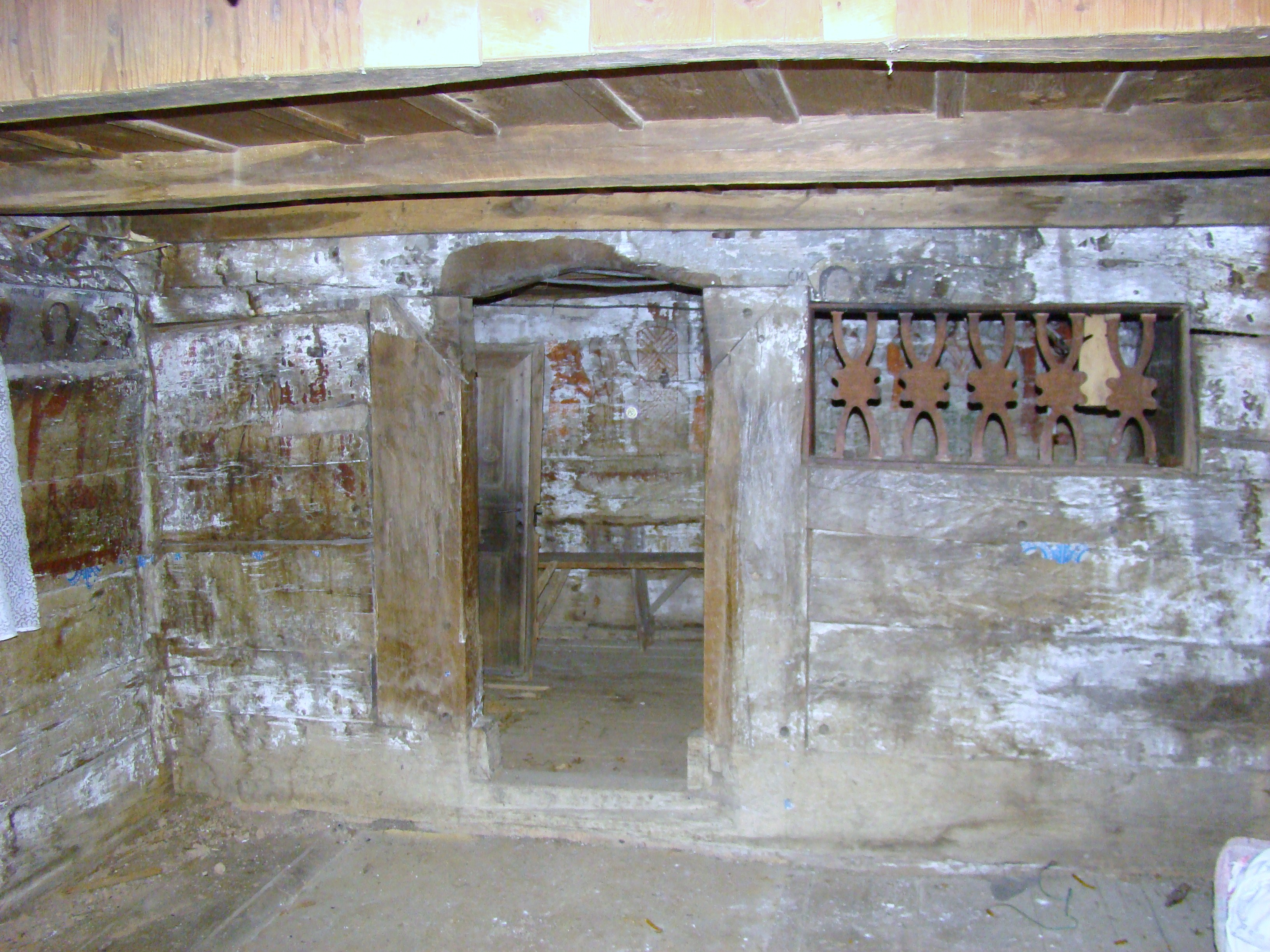 Biserica Sfinţii Arhangheli, Sat Brusturi, Comuna Creaca, județul Sălaj